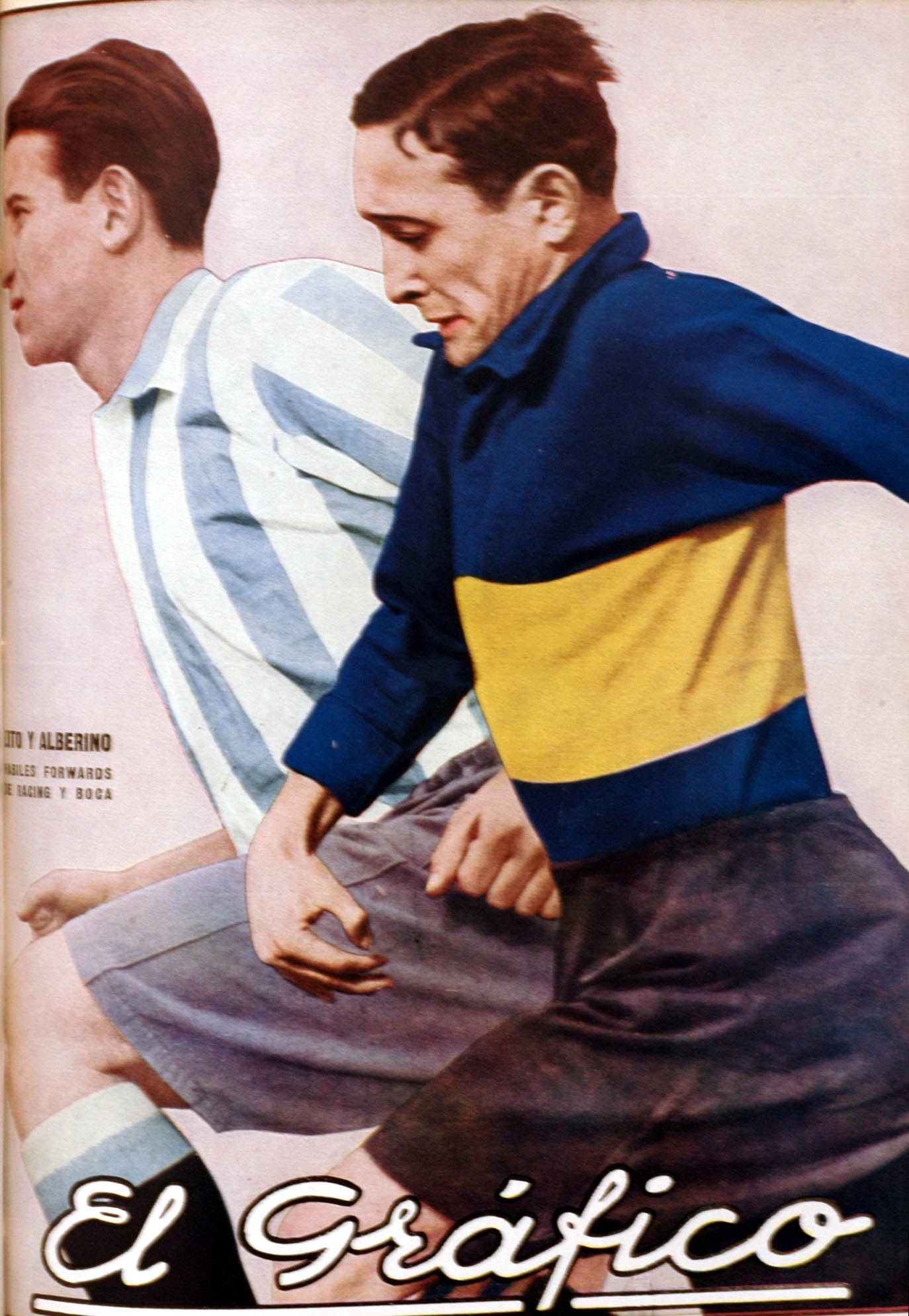 El Grafico del 08 de Julio de 1933. Edicion 730